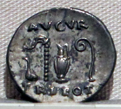 Palazzo Massimo alle Terme